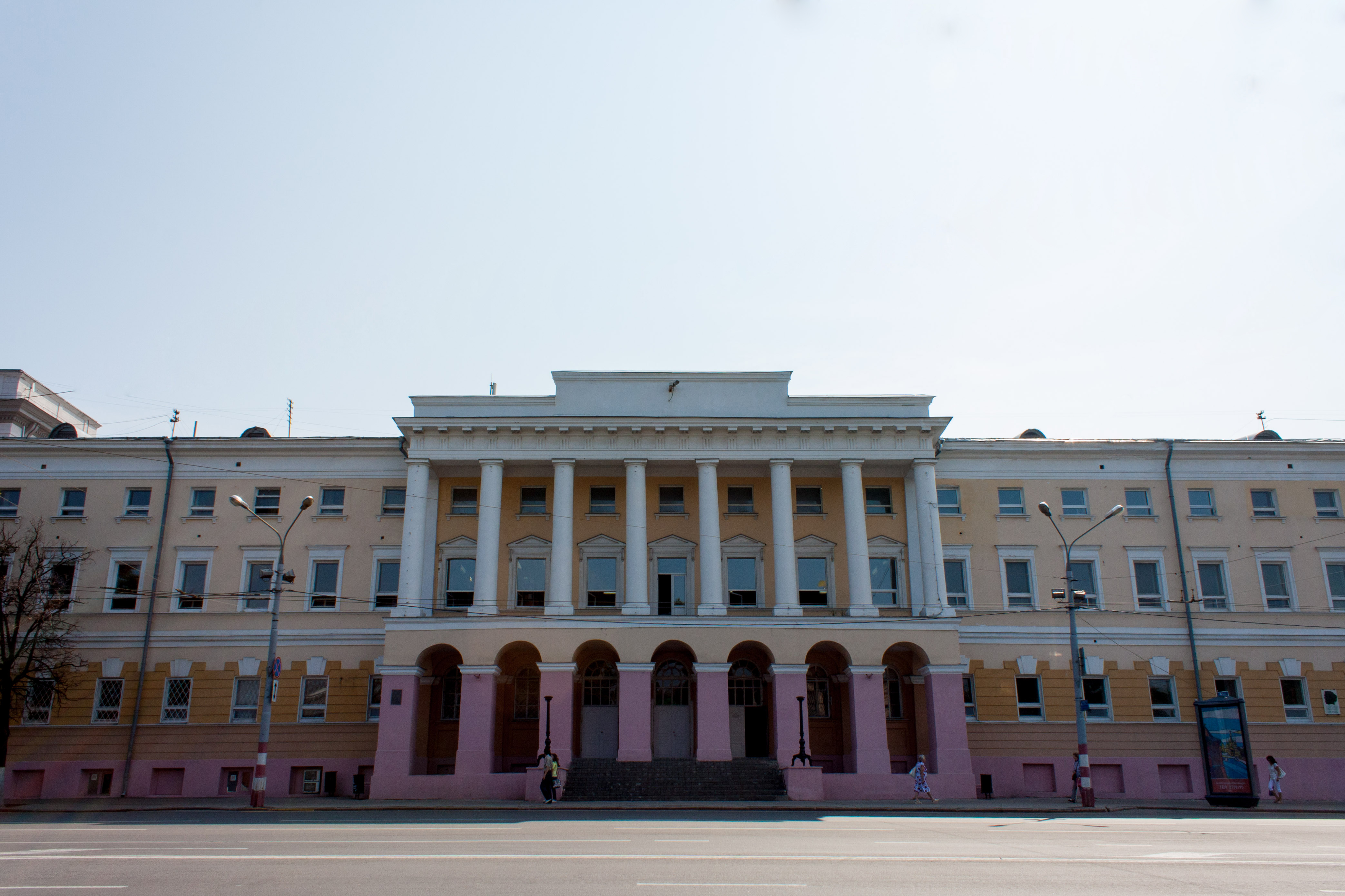 2 корпус